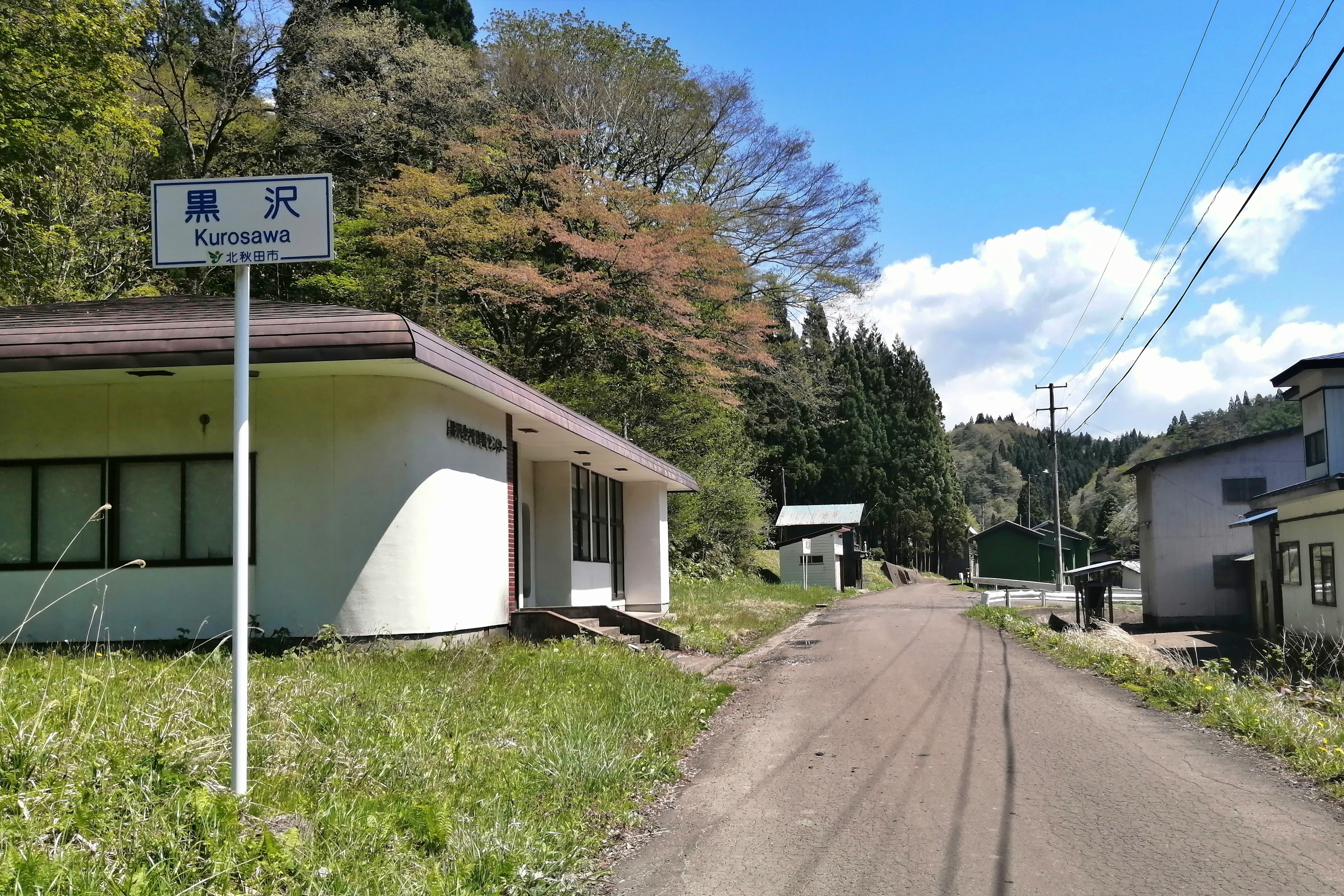 北秋田市黒沢地区